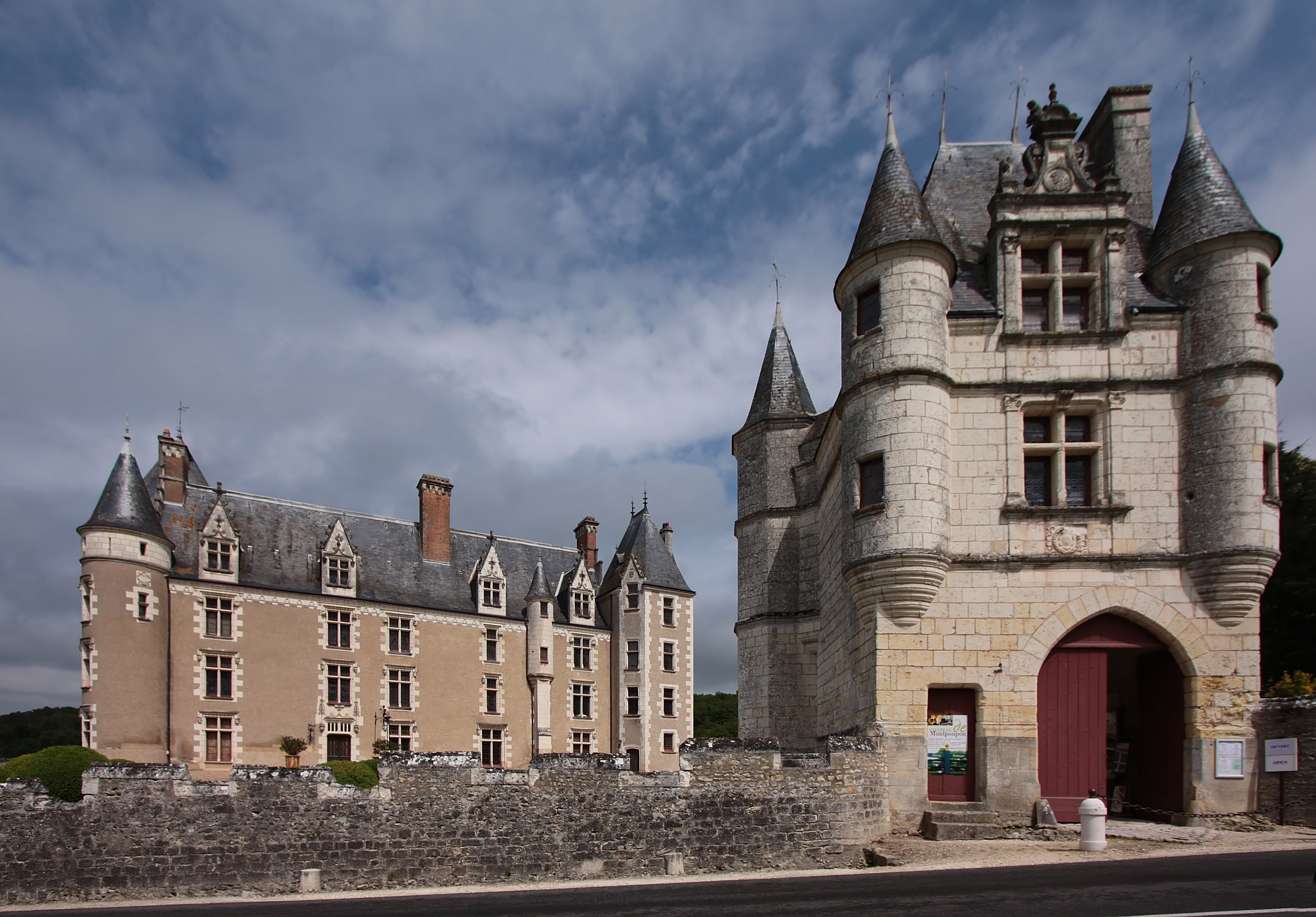 Schloss Montpoupon im Département Indre-et-Loire/Frankreich - Die Schlossanlage mit Torhaus und Wohntrakt.